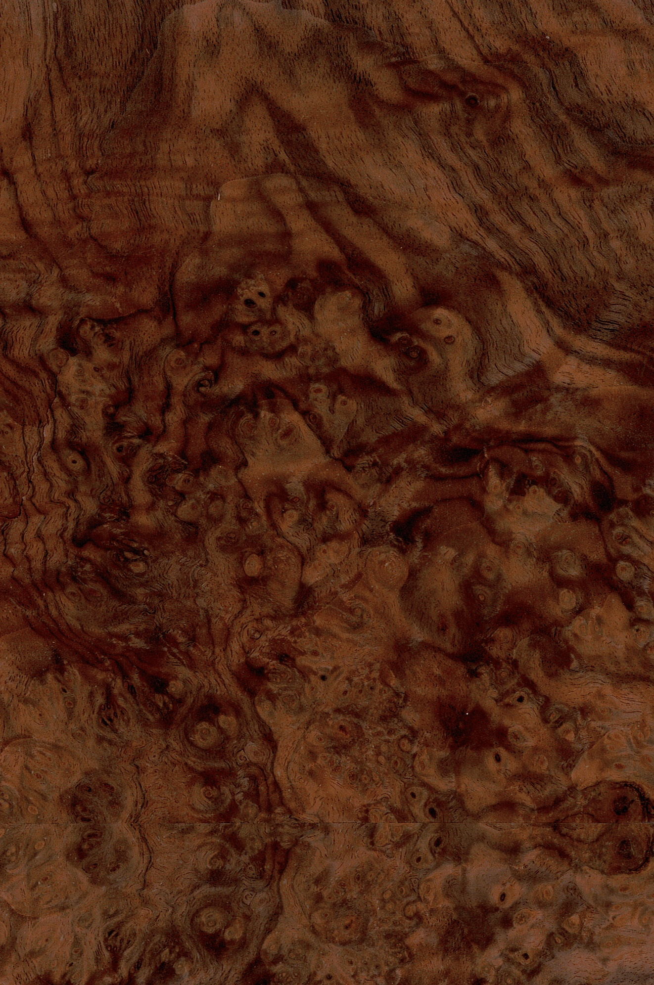 Der Schwarznussbaum (Juglans nigra) ist eine Pflanzenart aus der Familie der Walnussgewächse (Juglandaceae). Die Schwarznuss wächst im östlichen Nordamerika und in Texas und dient dort als Lieferant von Nutzholz. Seine Früchte sind essbar. In Europa wird er als Zierbaum, oder als Unterlage für veredelte Walnussbäume verwendet.